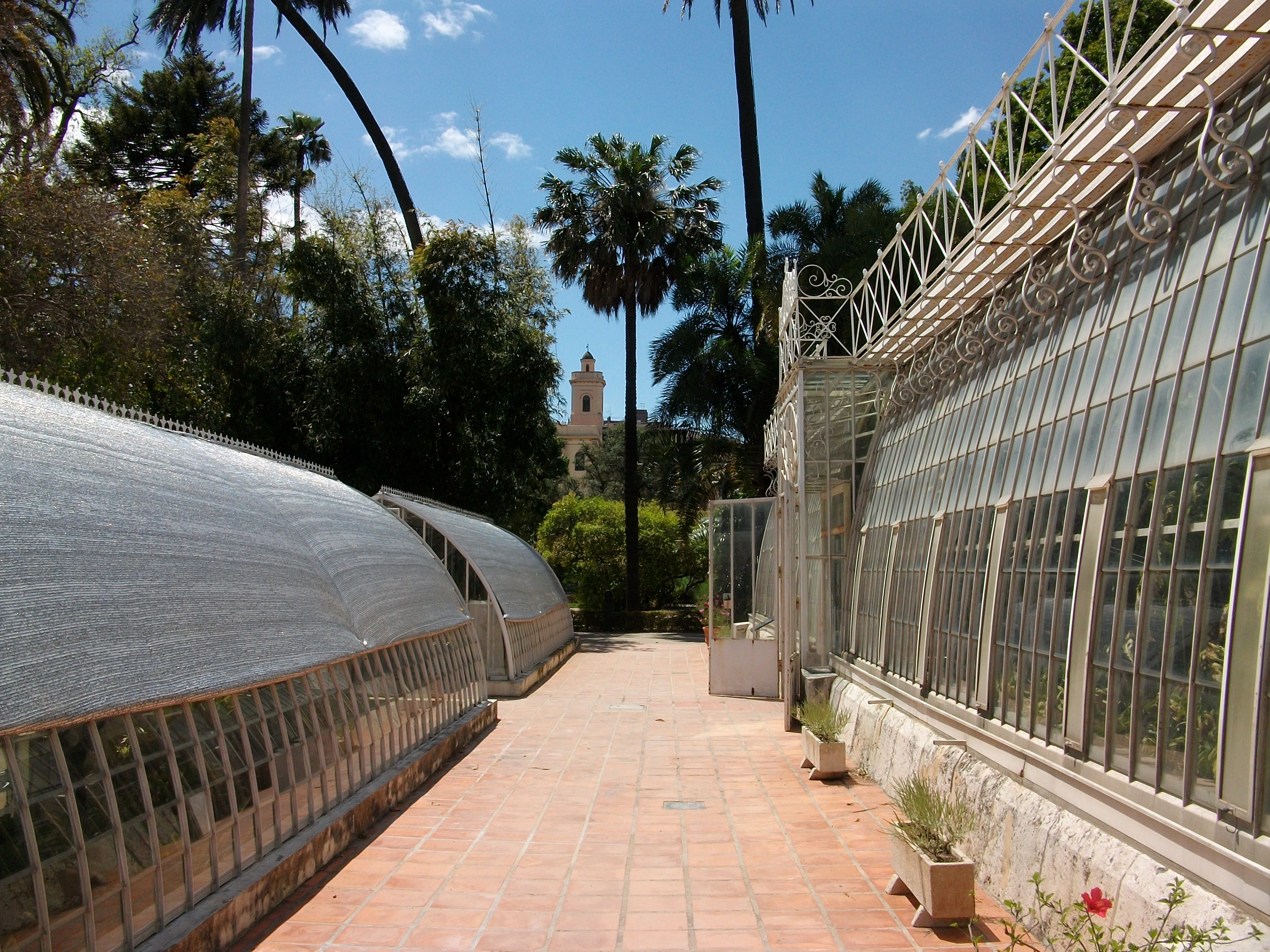 Hivernacles al jardí botànic de València.